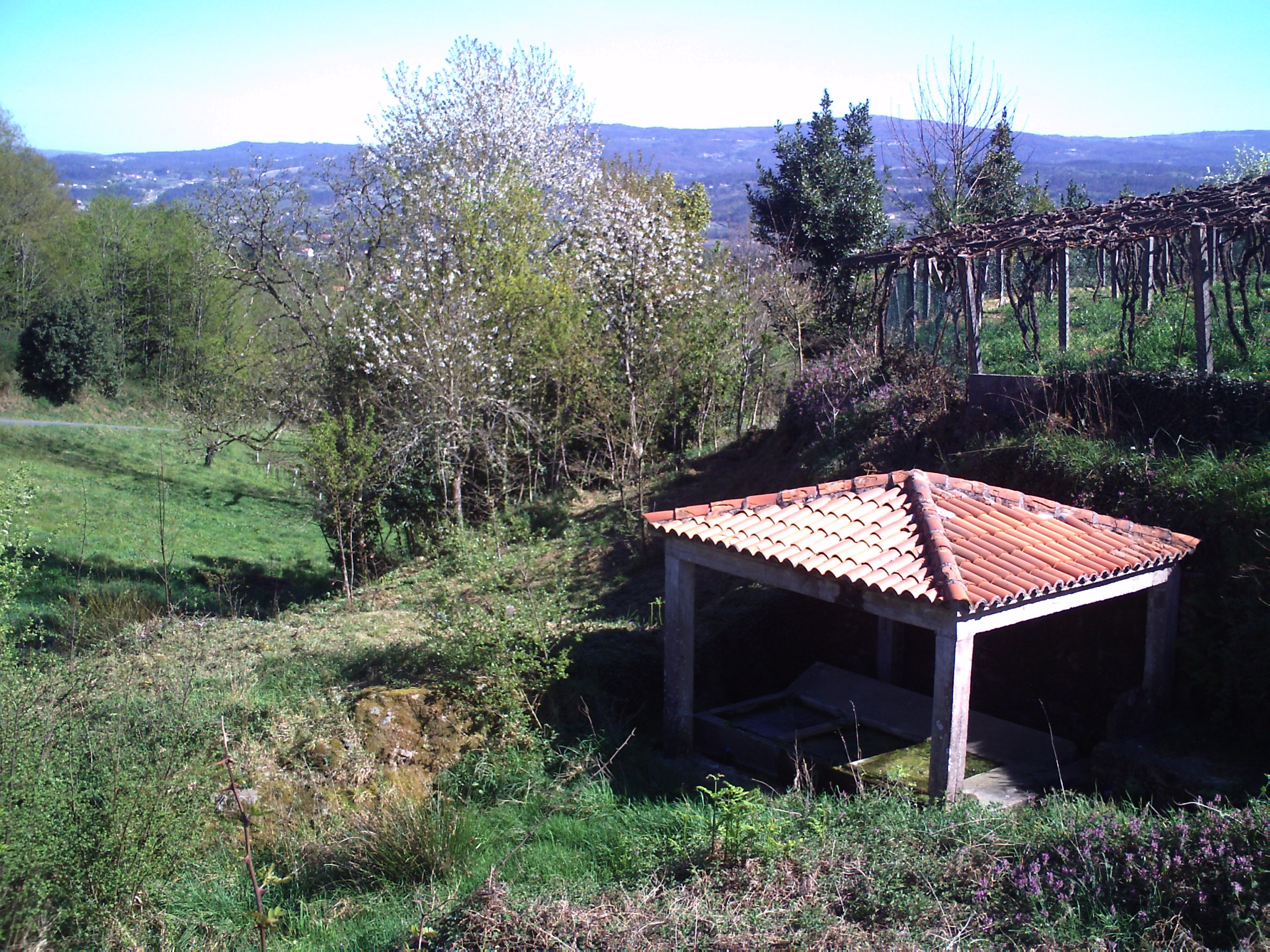 Fuente y lavadero en la aldea de Cimadevila (San Miguel de Sarandón, Vedra, Galicia, España)